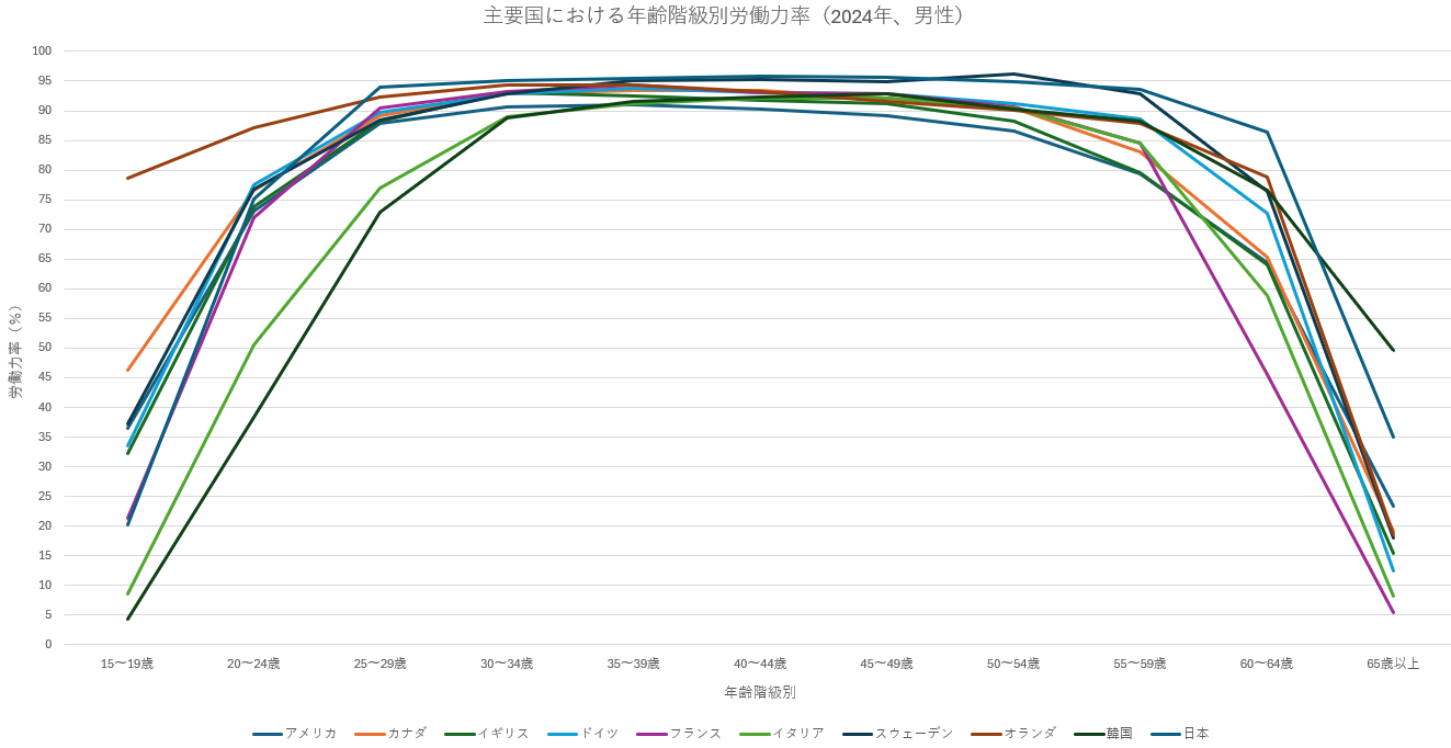 主要国の年齢階級別労働力率（2018年男性）